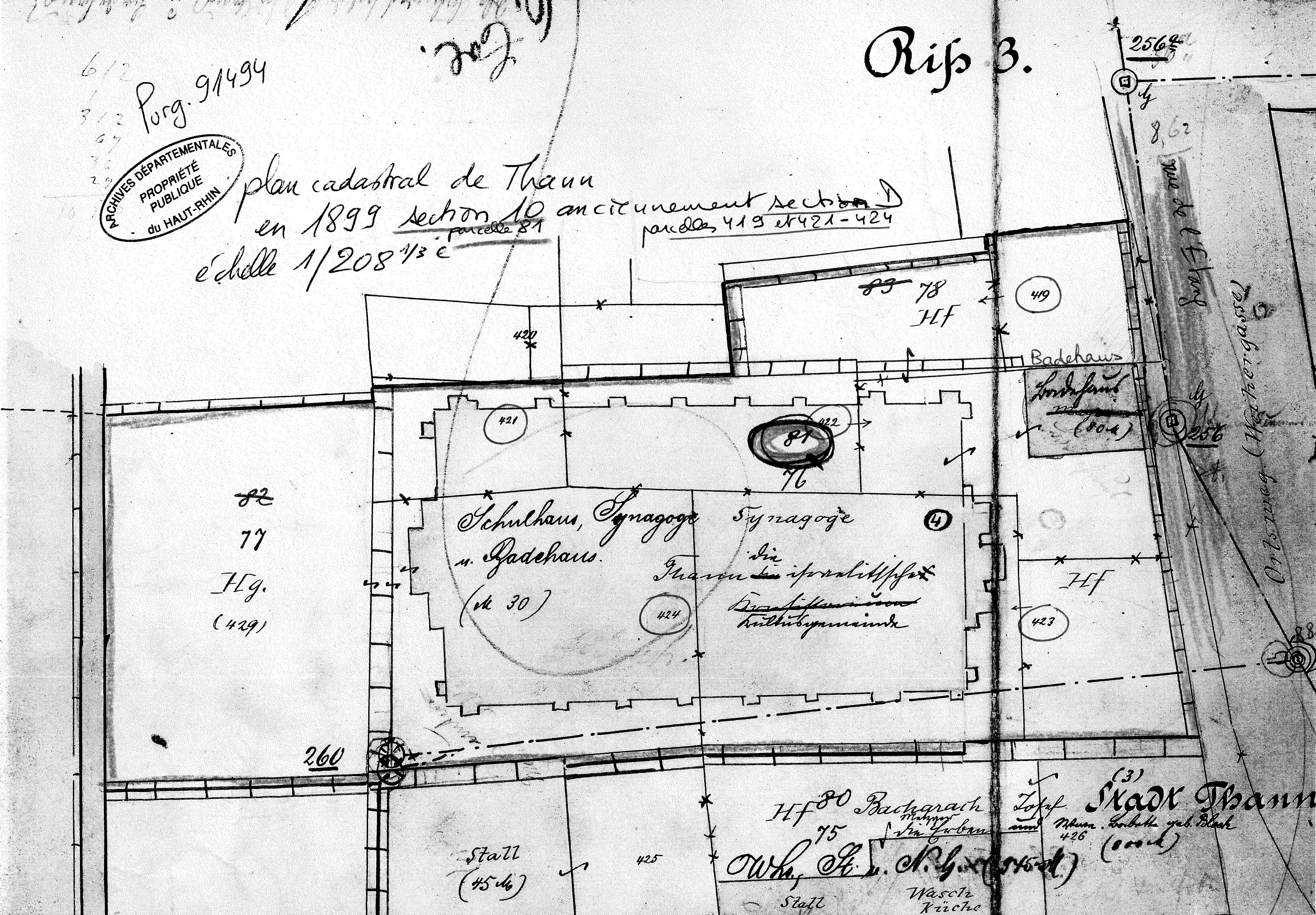 Thann plan cadastral synagogue et maison de bain